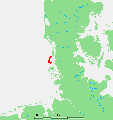 Wadden - Sylt.PNG